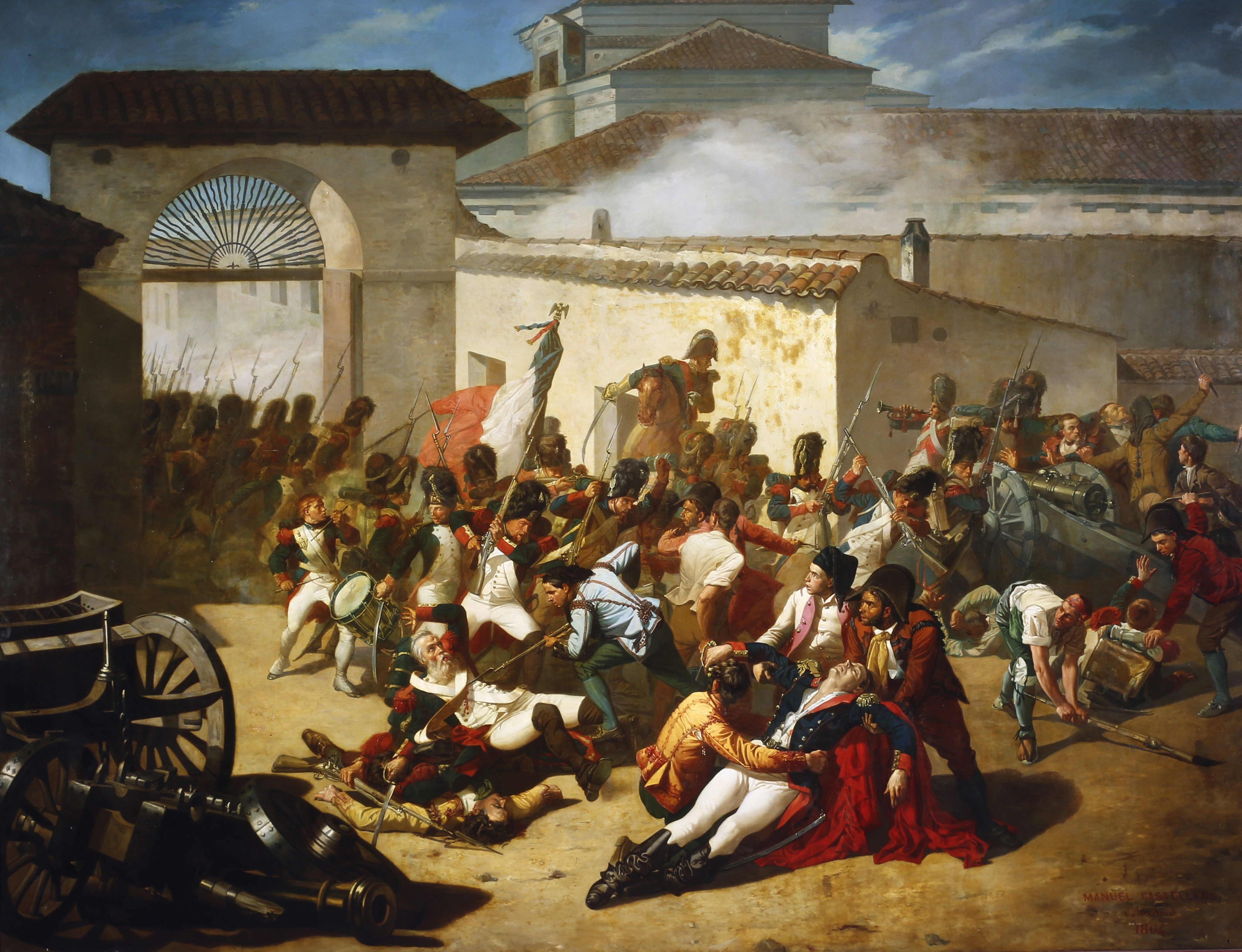 Cuadro sobre la muerte de Velarde el Dos de Mayo.